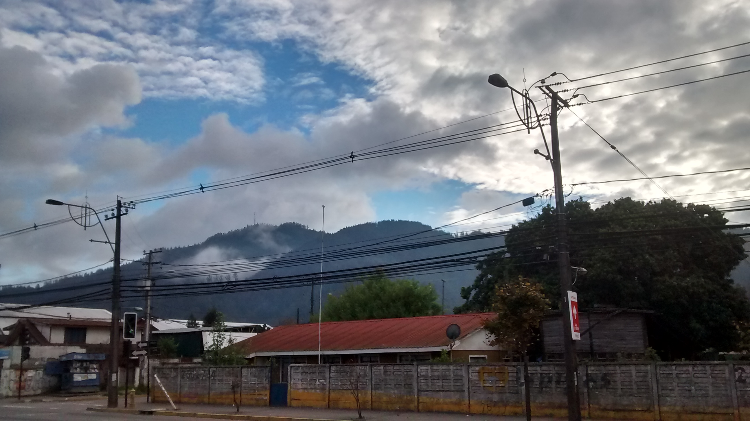 Chiguayante